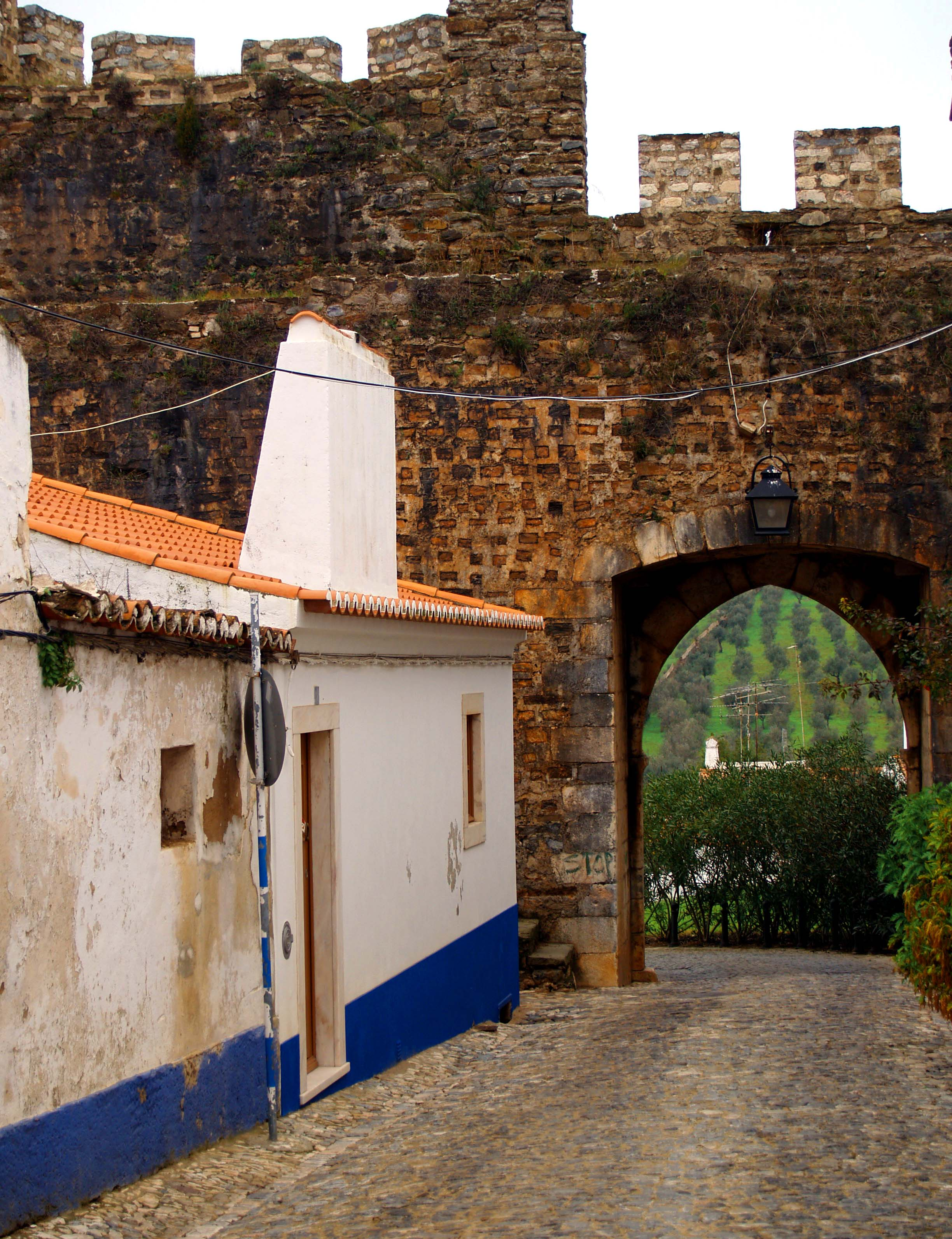 Gate of Vila Viçosa, Portugal